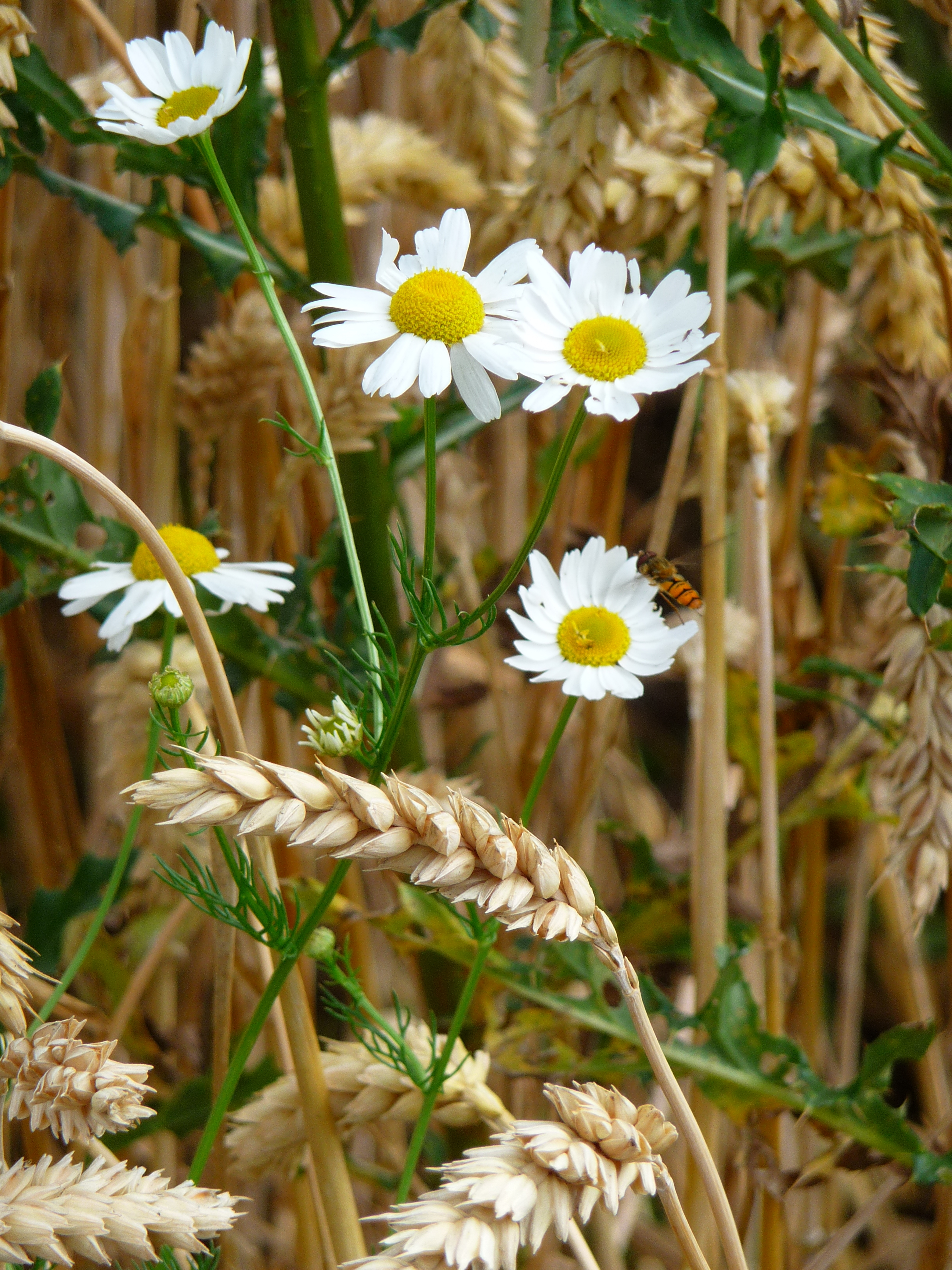 Kamille (mir unbekannter Art) in einem Weizenfeld (ebenfalls von mir nicht bestimmbar ist das fliegende Insekt in der rechten Bildschirmhälfte)